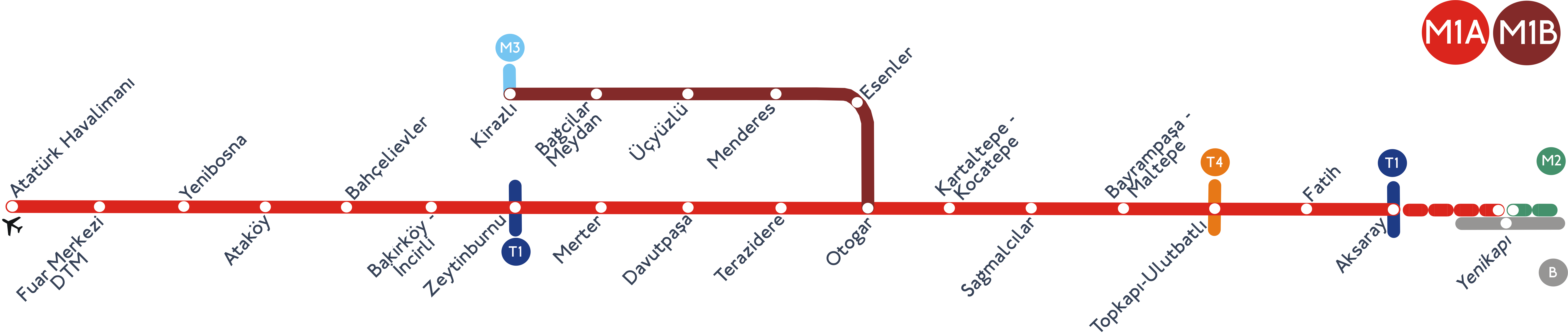 Metro Istanbul (M1A & M1B)